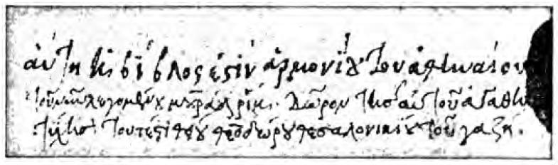 Inschrift in Griechisch